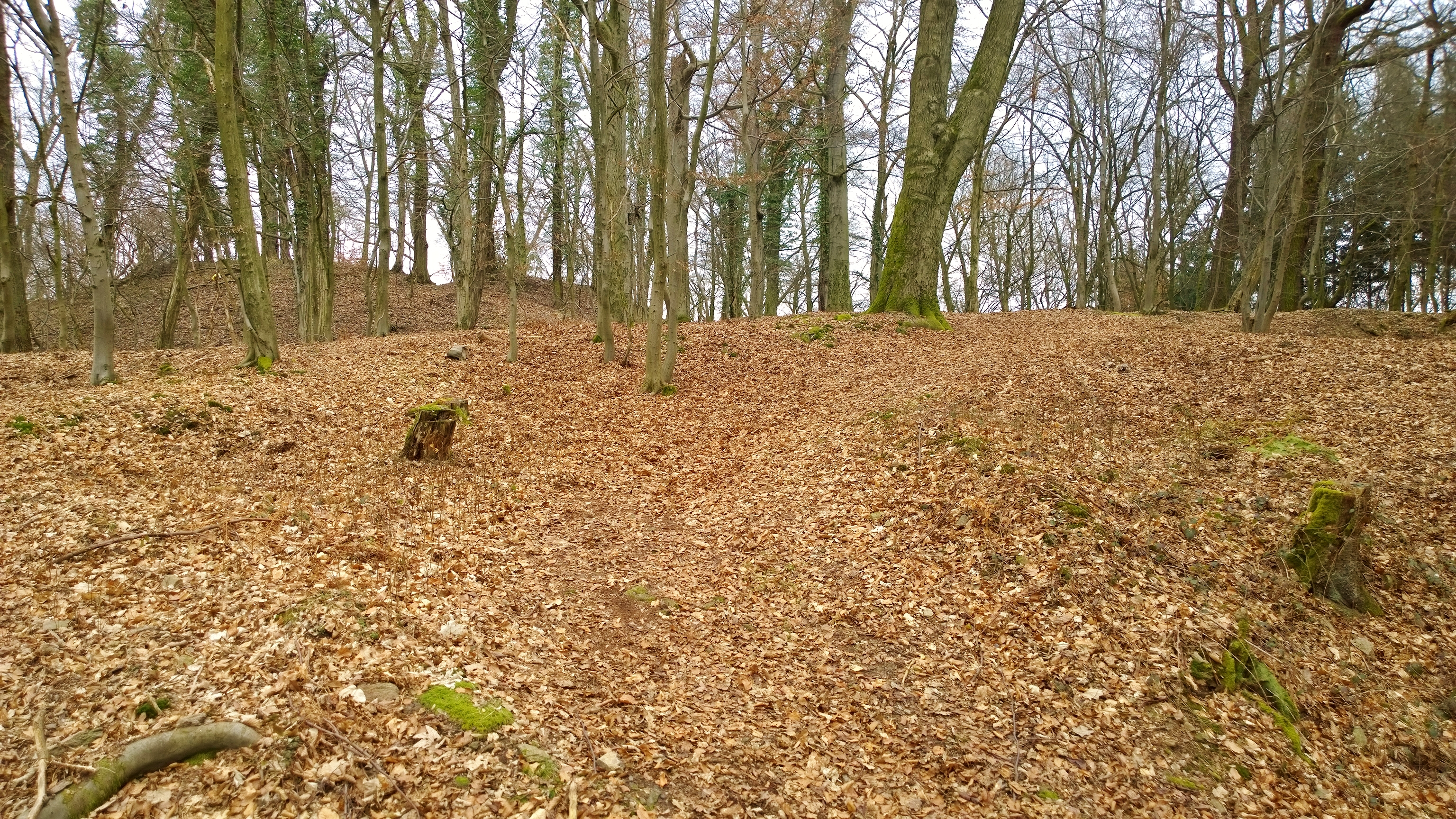 Blick von Süden über die Vorburg auf den Turmhügel des Burgstalles Kugelberg